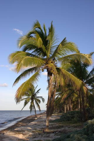 Playa de Telchac Puerto